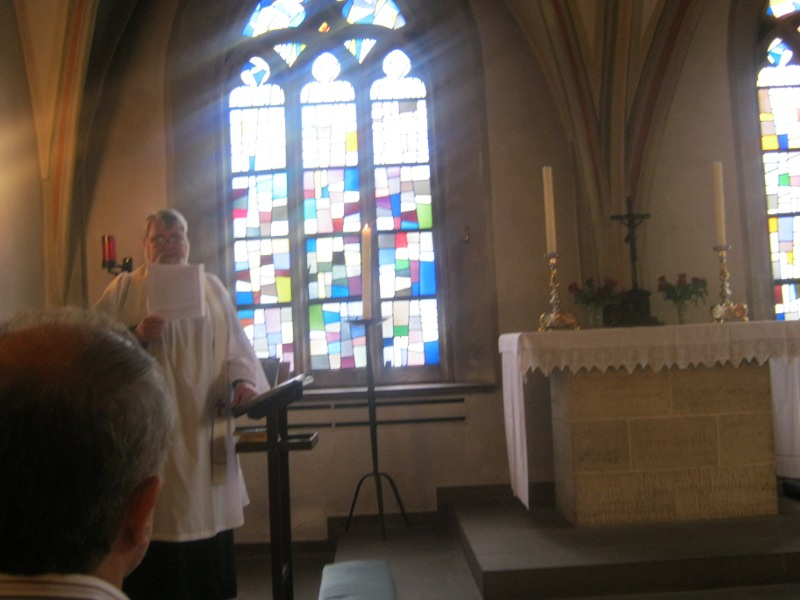 Luterańska Liturgia Godzin w Brunszwiku